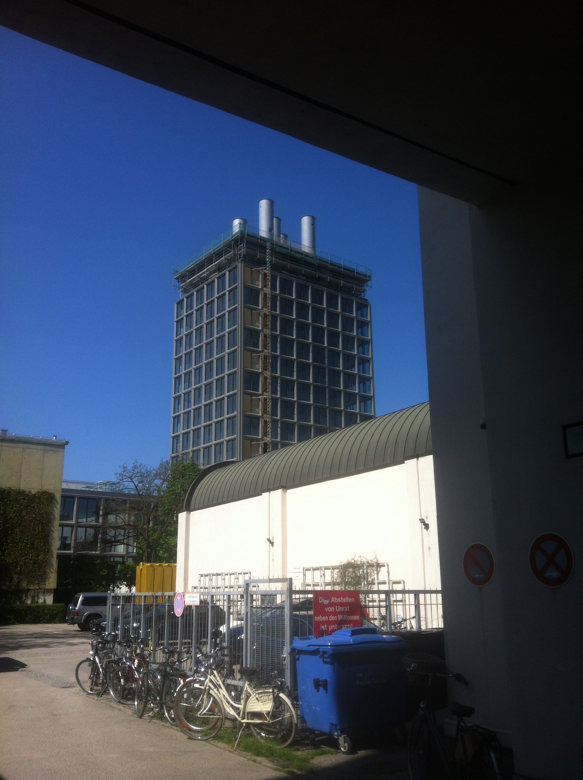 The Seven, Hochhaus, Mai 2013